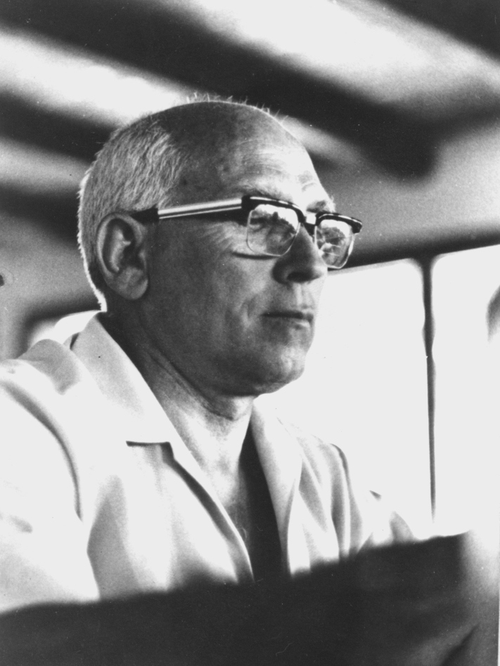 Fotografía del pintor en su estudio de Riells del Fai (Barcelona)